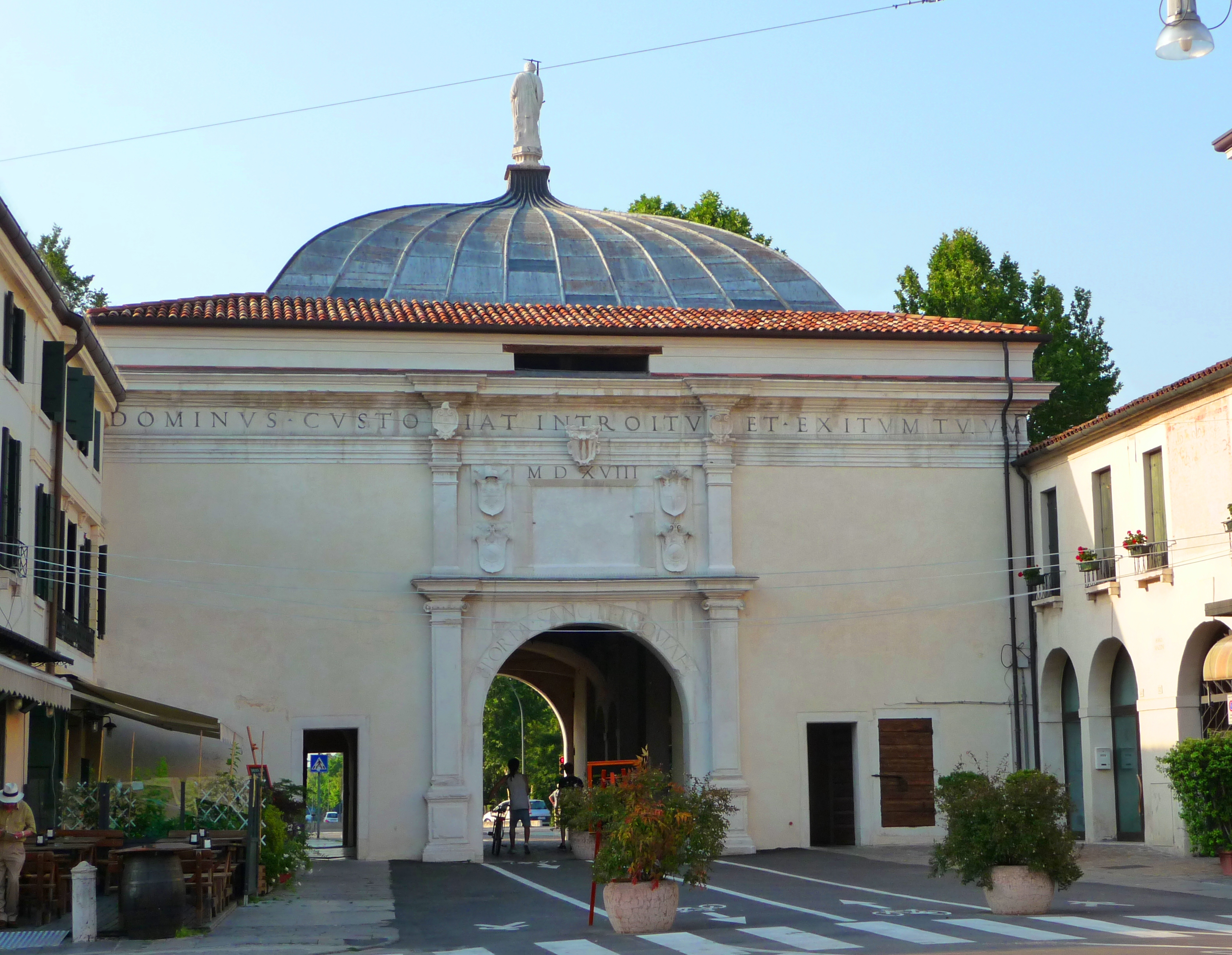 Porta San Tomaso in Treviso (IT); Blick von Süden (Innenansicht des Tores).